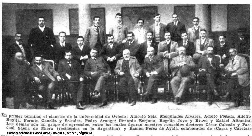 Universidad de Oviedo académicos. En primer término, el claustro de la universidad de Oviedo: Aniceto Sela, Melquíades Álvarez, Adolfo Posada, Adolfo Buylla, Fermín Canella y Secadas, Pedro Arango, Gerardo Berjano, Rogelio Jove y Bravo y Rafael Altamira. Los demás son un grupo de egresados entre los cuales figuran nuestros conocidos doctores Cesar Calzada y Pascual Sáenz de Miera (residentes en la Argentina) y Ramón Pérez de Ayala, colaborador de Caras y caretas.